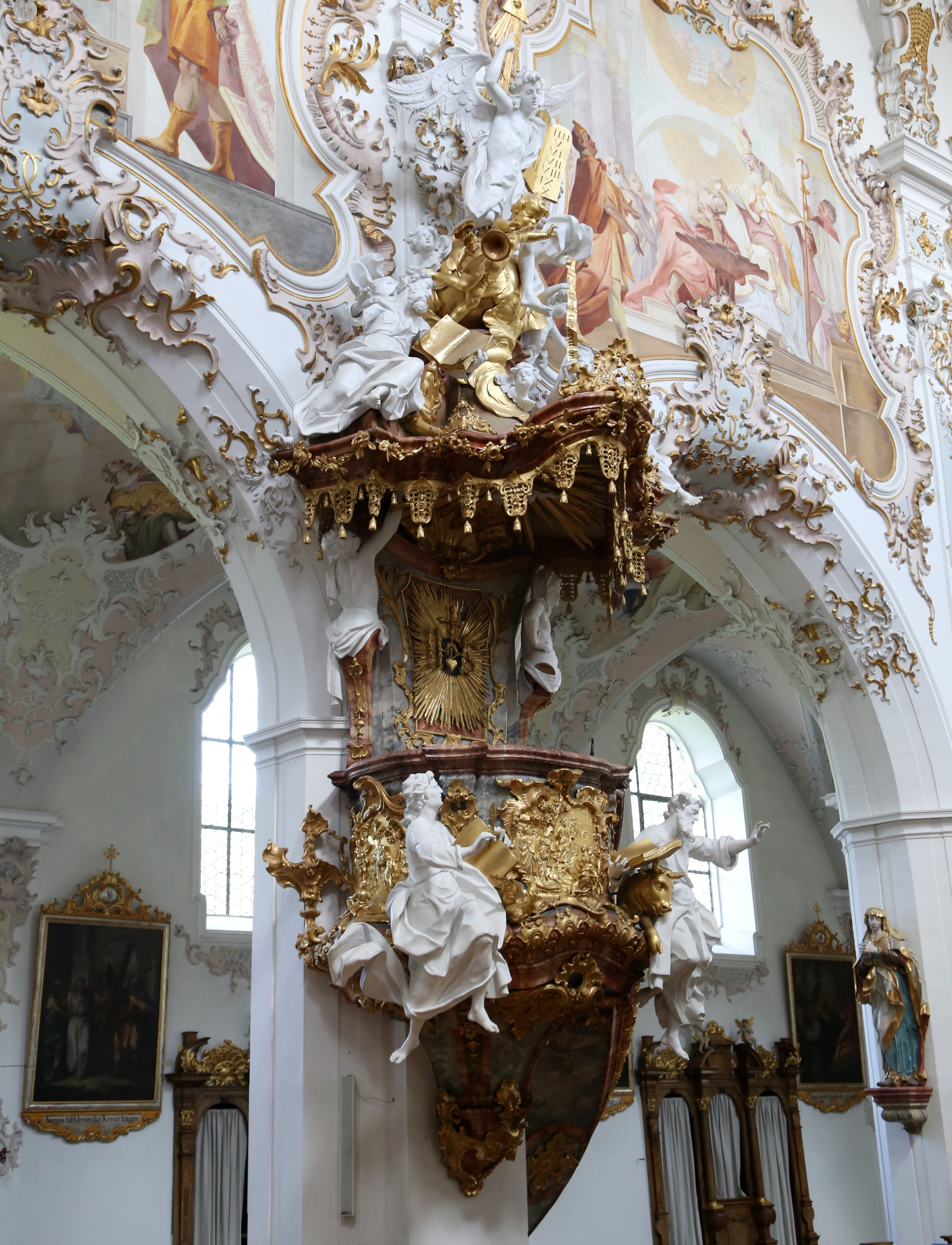 Kanzel; Katholische Pfarrkirche Mariä Geburt, Rottenbuch